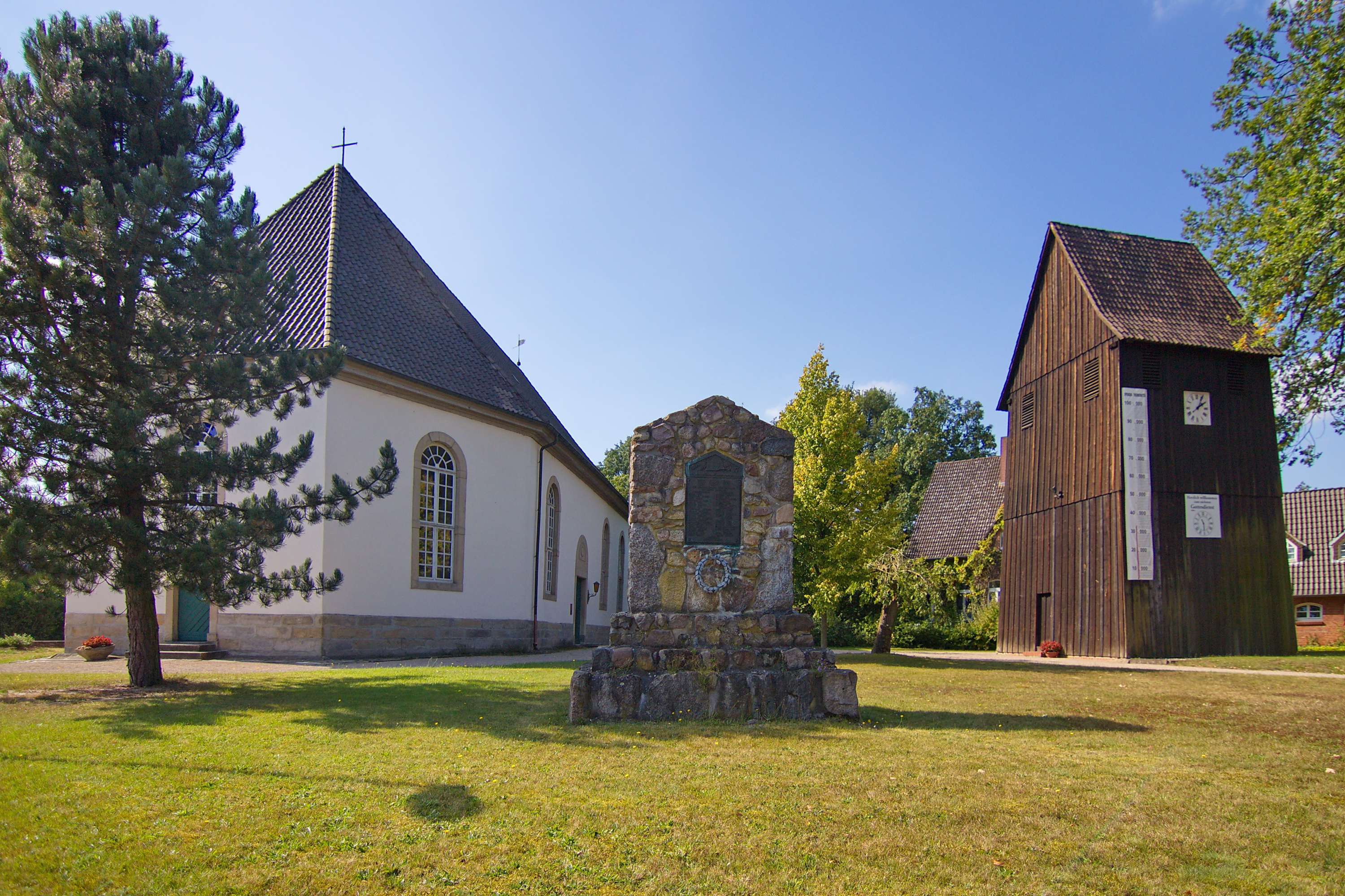 Die Bezeichnung der Martinskirche in Beedenbostel kommt von Martin von Tours, der sein Hab und Gut mit den Armen teilte. Die Kirche wurde 1735 von Johann Pflug auf einem Vorgängerbau errichtet. Der Holzglockenturm ist älter.